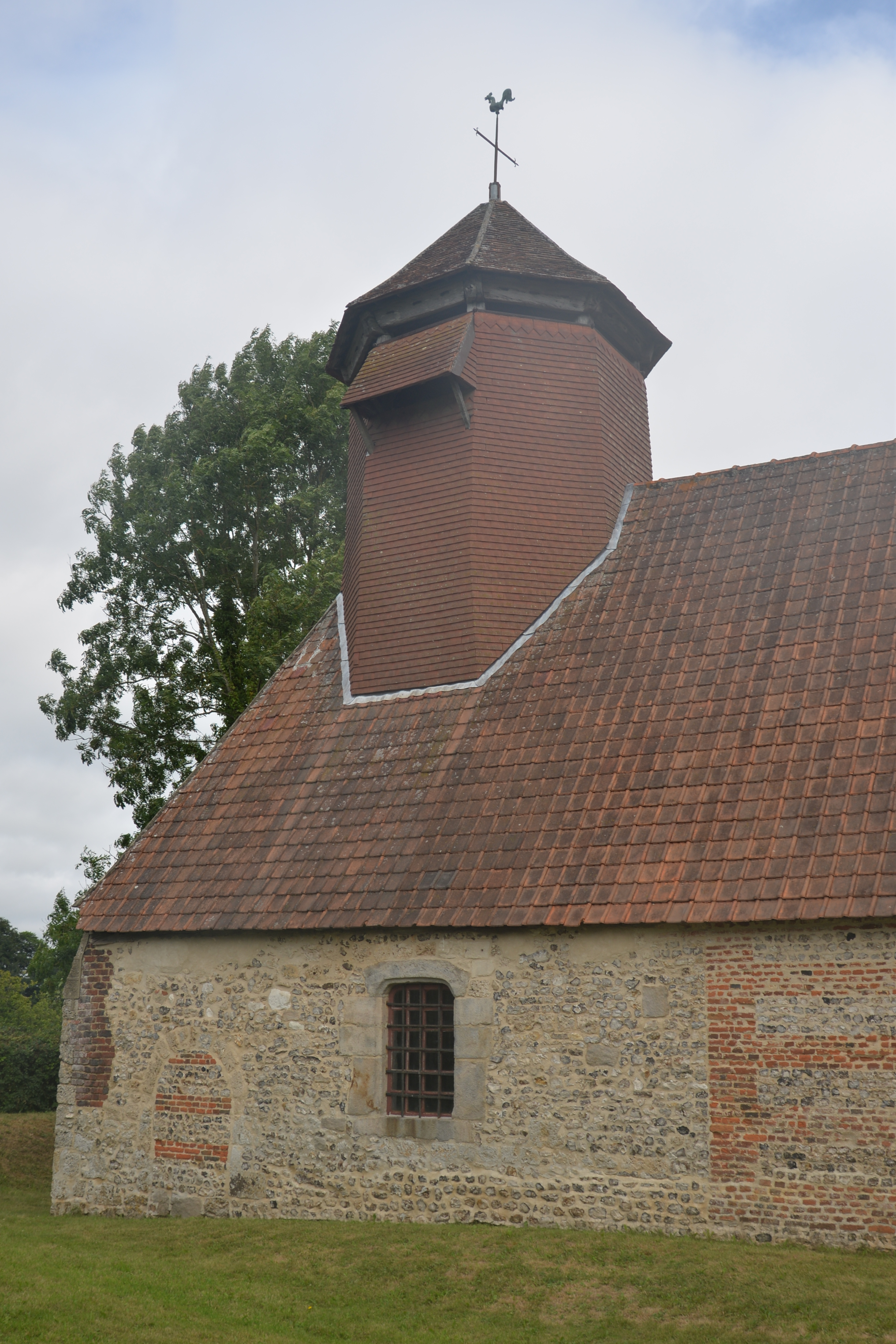 La chapelle du hameau Pelletot au Catelier, qui a été épargnée lors de la destruction du château Pelletot par la Révolution Française.